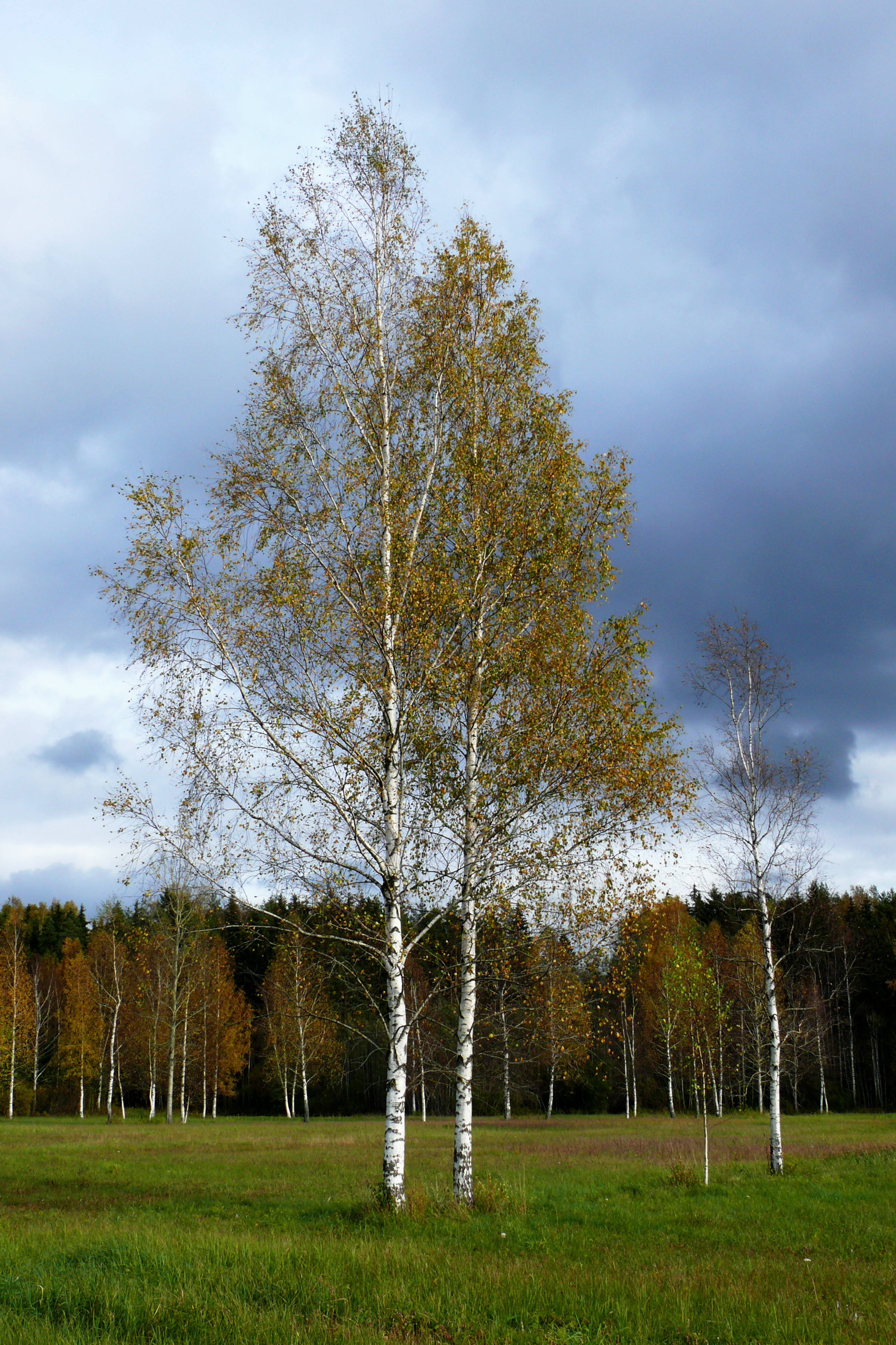 Arukask Türi vallas Järva maakonnas.